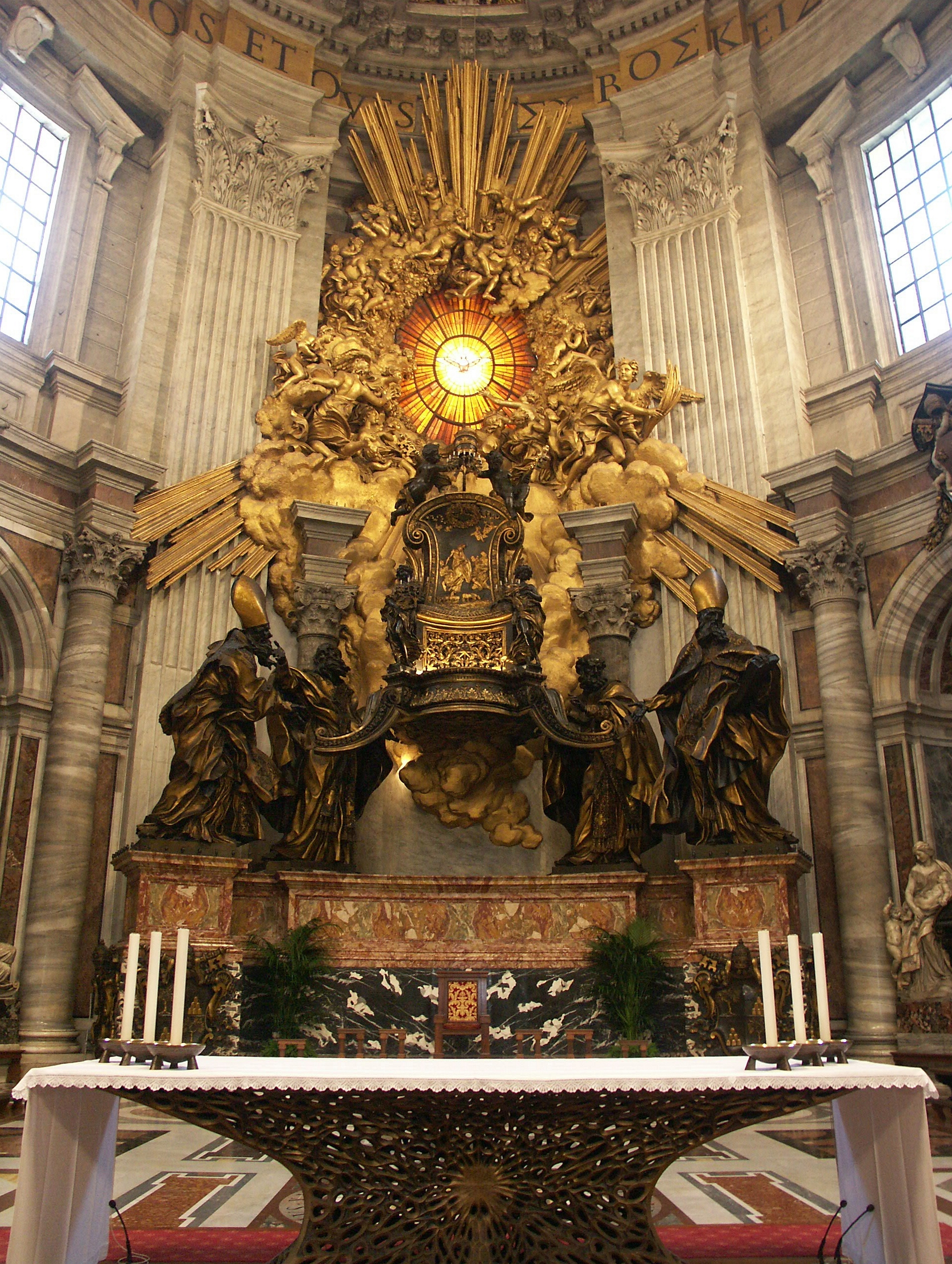 Rom, Vatikan, Petersdom, Cathedra Petri (Bernini)